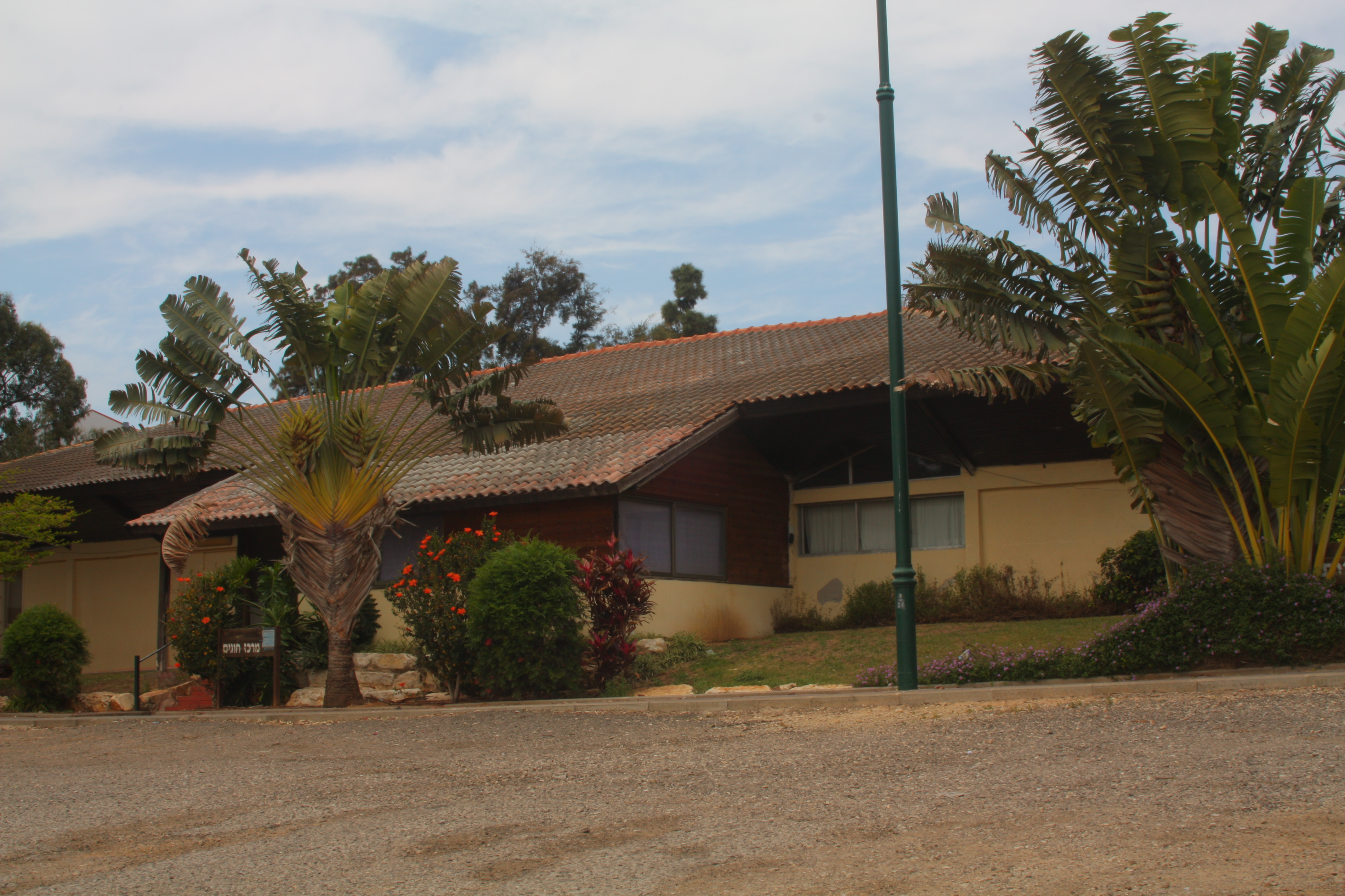 בית המזכירות בבית יהושע Beit Yehushua secretariat